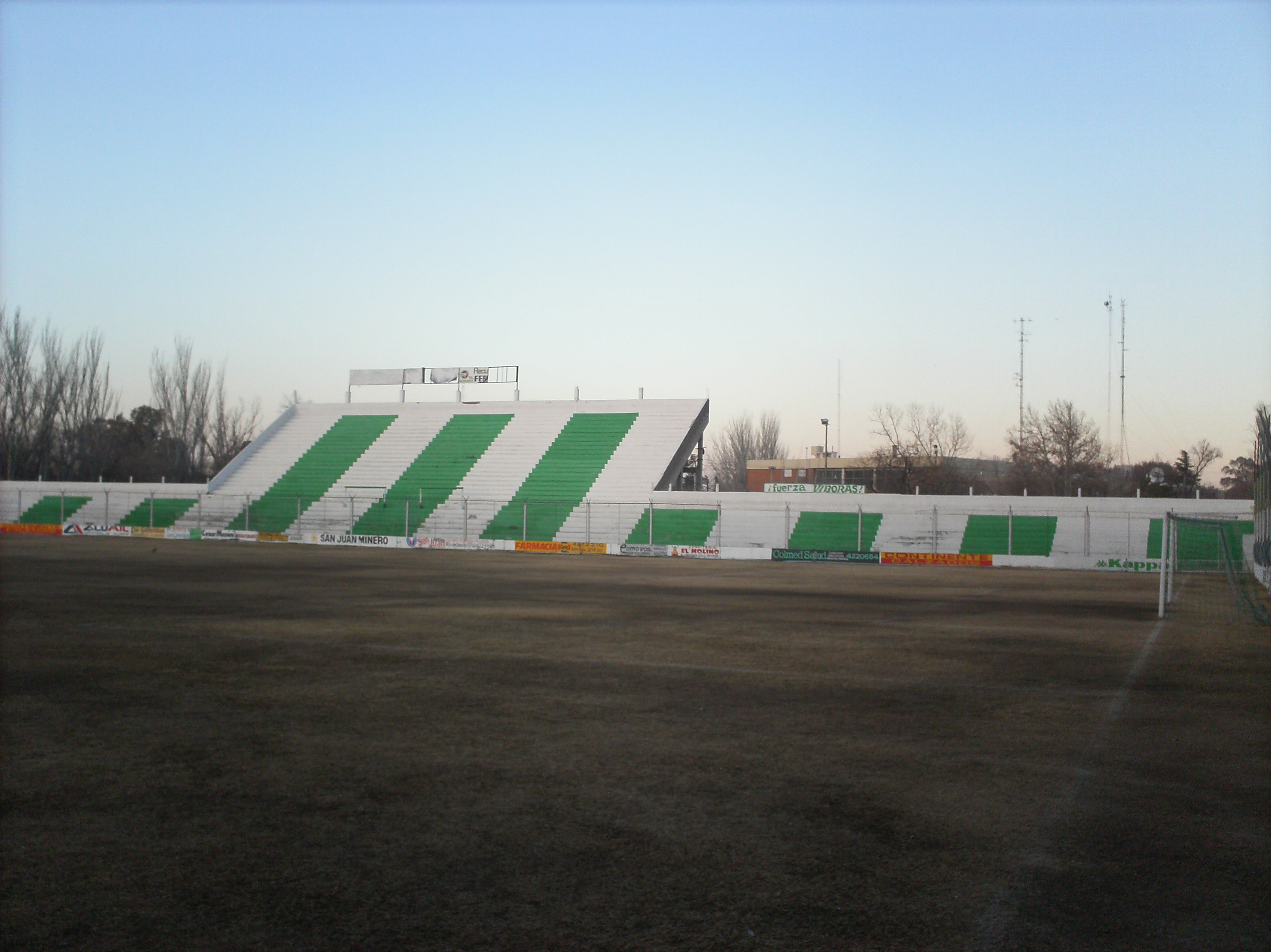 estadio serpentario tribuna popular